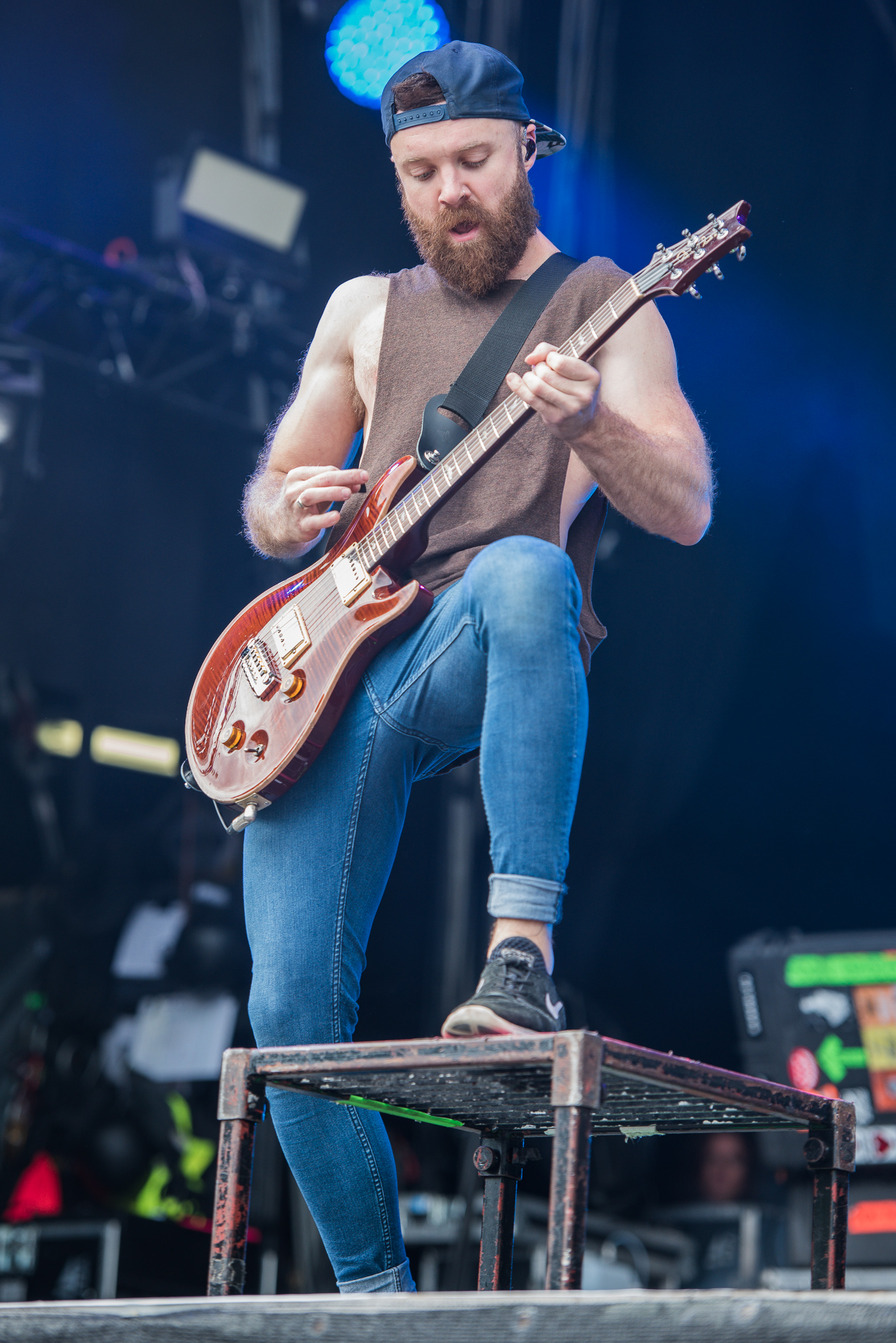 ARGO-Konzerte,Beck's Park Stage,Don Broco,Konzert,Livekonzert,Livemusik,Musik,RiP,Rock im Park 2017,Simon Delaney